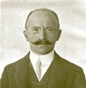 Stark Lipót gépészmérnök, erőműtervező, technikatörténész, a vezetékszámítás magyar úttörője; a Magyar Villamosművek Országos Szövetségének alapítója, és elnöke. Az Elektromos Művek első vezérigazgatója.